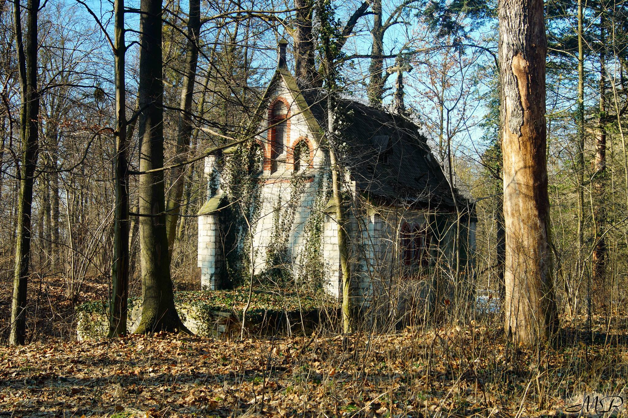 Mauzoleum rodziny Seherr-Thoss - stan obecny